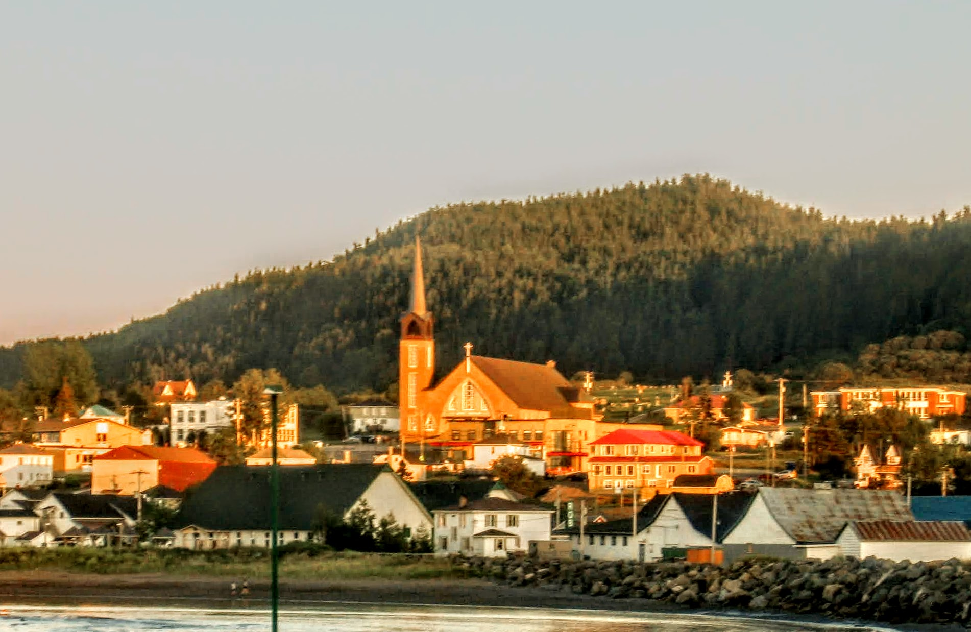 Rivière-au-Renard